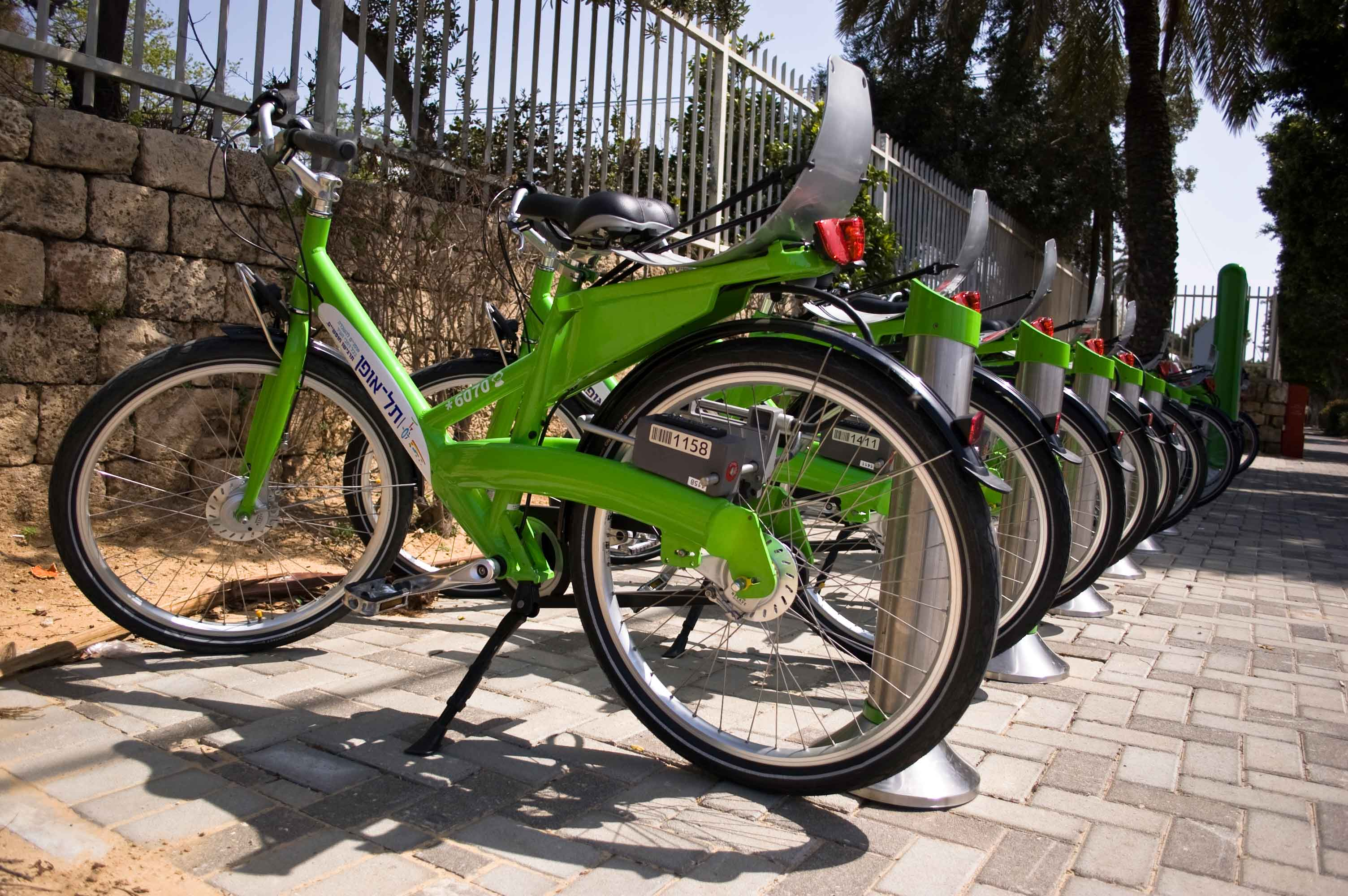 אופני תל-אופן ברחוב הרצל בדרום תל אביב.